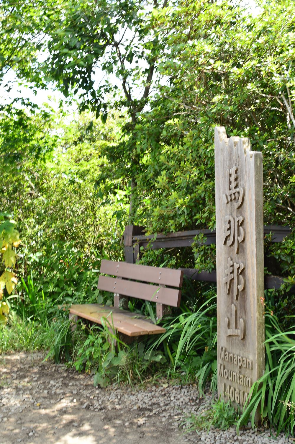 中文（台灣）: 馬那邦山山頂2017